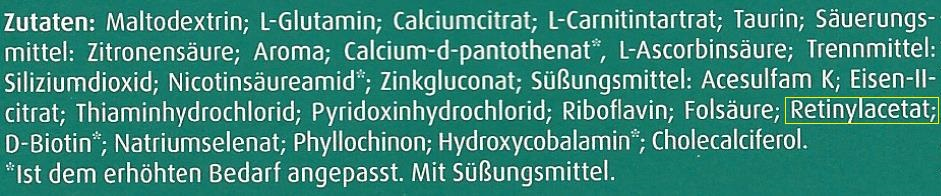 Inhaltsstoffe von Hustenbonbons